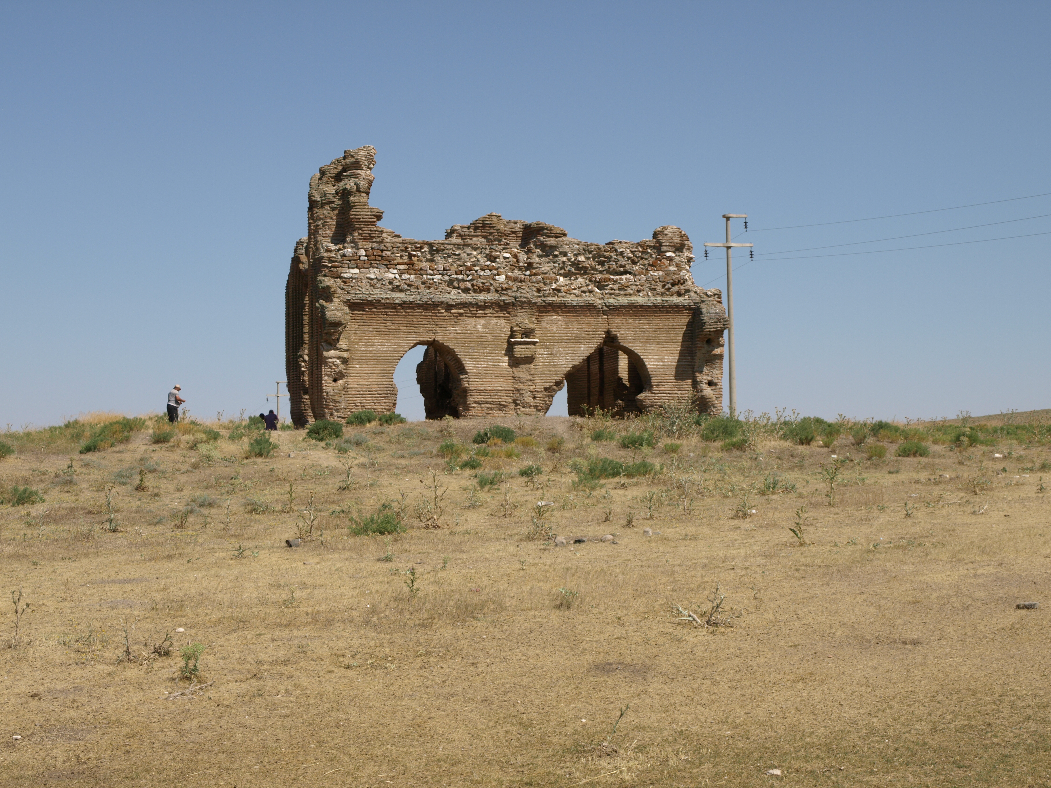 Gesamtansicht der Kirchenruine Üçayak (Kırşehir)